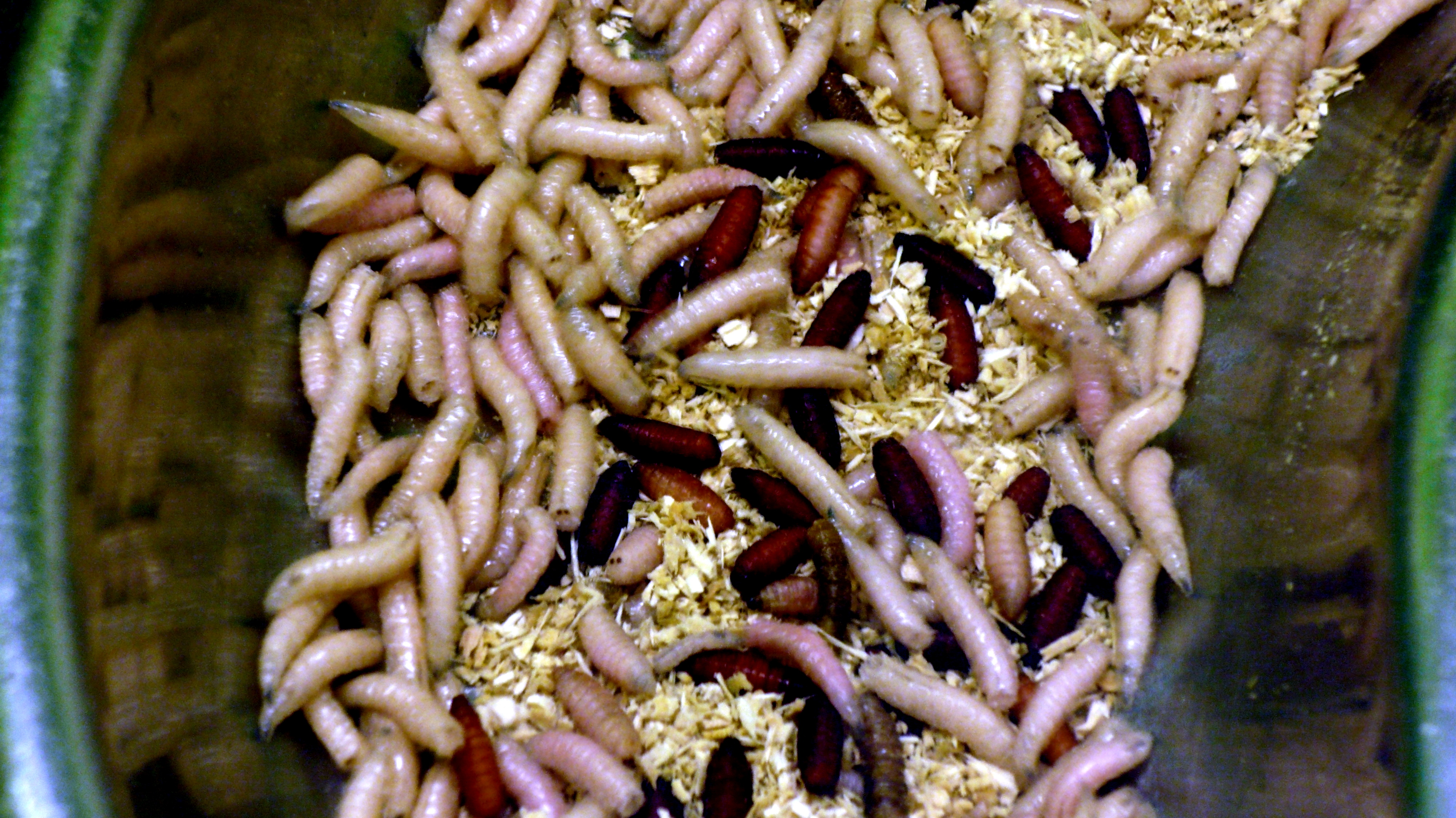 Maggots